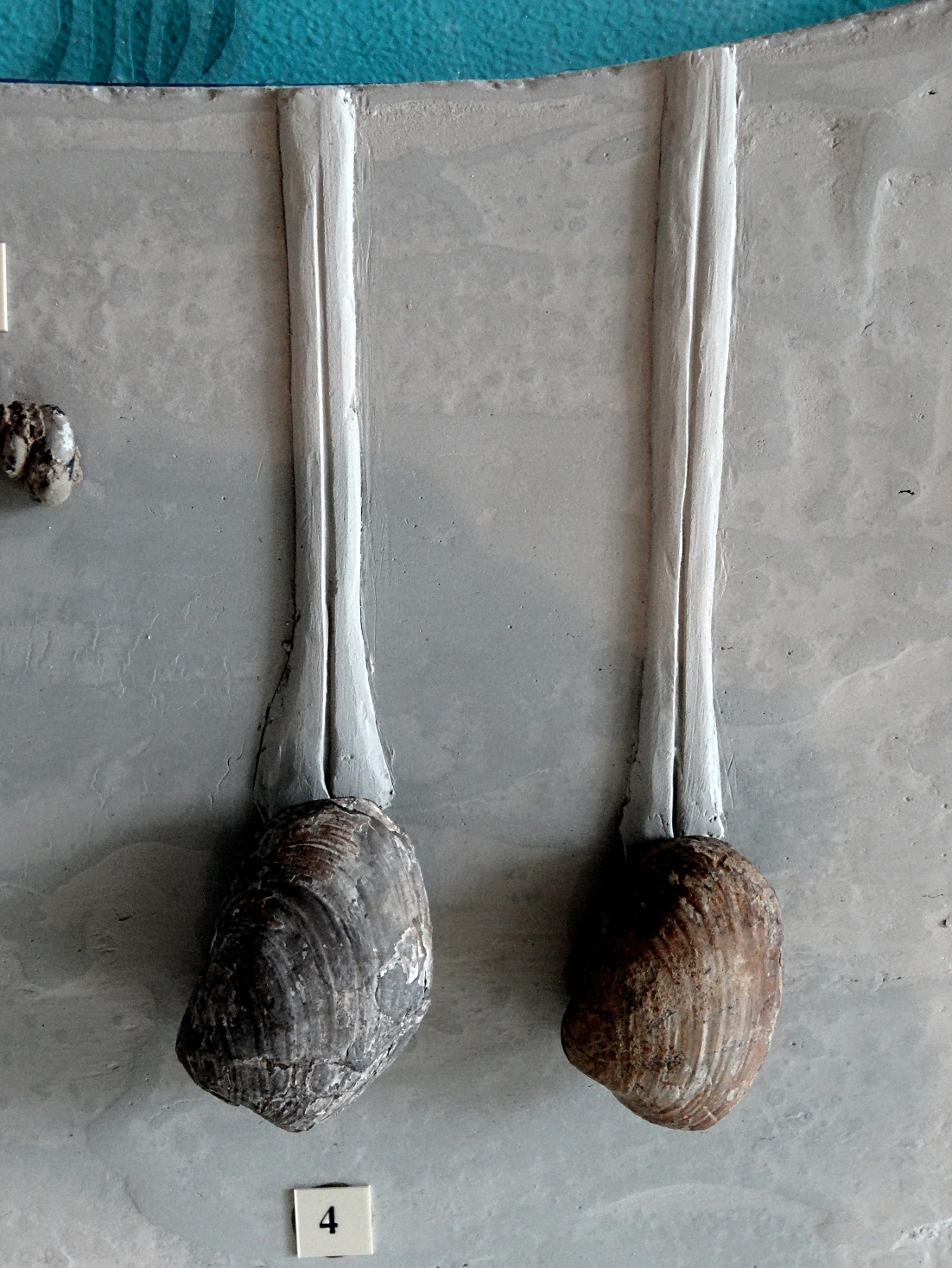 Klaffmuschel Pleuromya uniformis aus dem Schwarzen Jura der Fränkische Alb; Fundort nahe Bad Staffelstein /Oberfranken; Exponat als Dioramadarstellung in der Petrefaktensammlung Kloster Banz